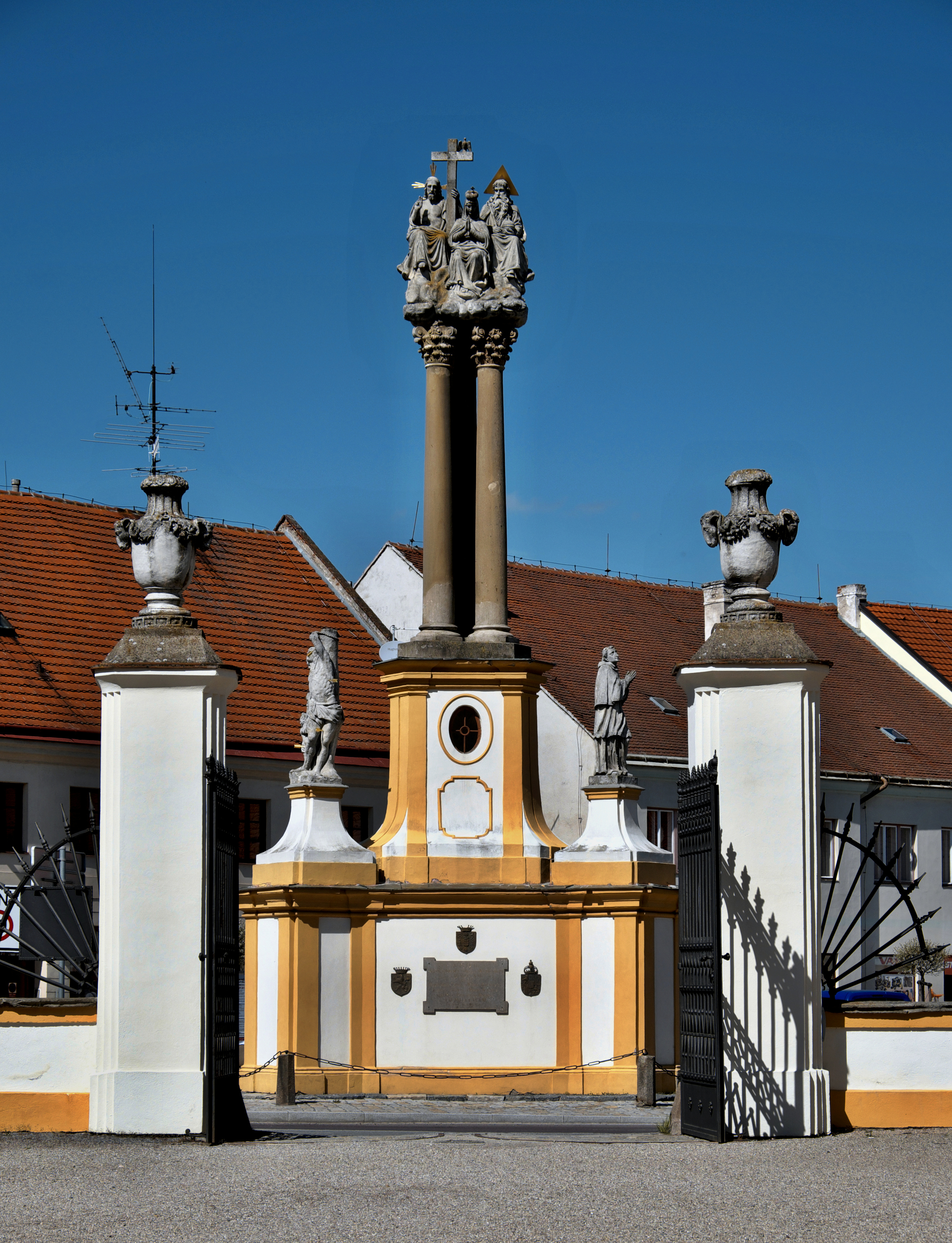 Marien- und Dreifaltigkeitssäule in Jaroměřice nad Rokytnou im Okres Třebíč in der Region Hochland (Kraj Vysočina) in Tschechien